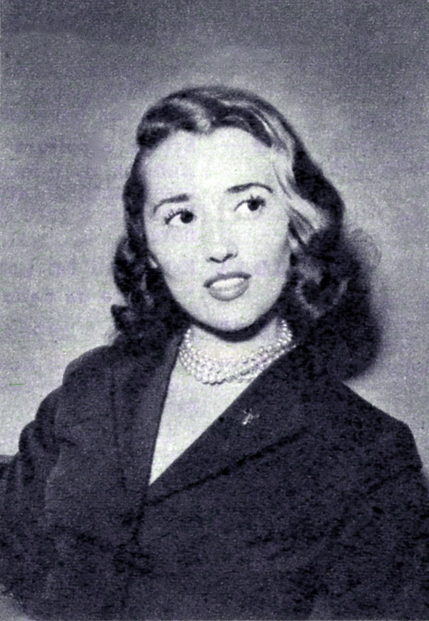 Gusella Sofio nel 1957